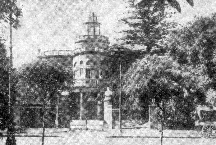 Palacio Miró en Buenos Aires. Se encontraba ubicado frente a la Plaza Lavalle en la manzana flanqueda por las calles Viamonte, Libertad, Córdoba y Talcahuano, con entrada principal por Viamonte. Fue demolido en 1937 para ampliar la Plaza Lavalle. Foto tomada desde Plaza Lavalle